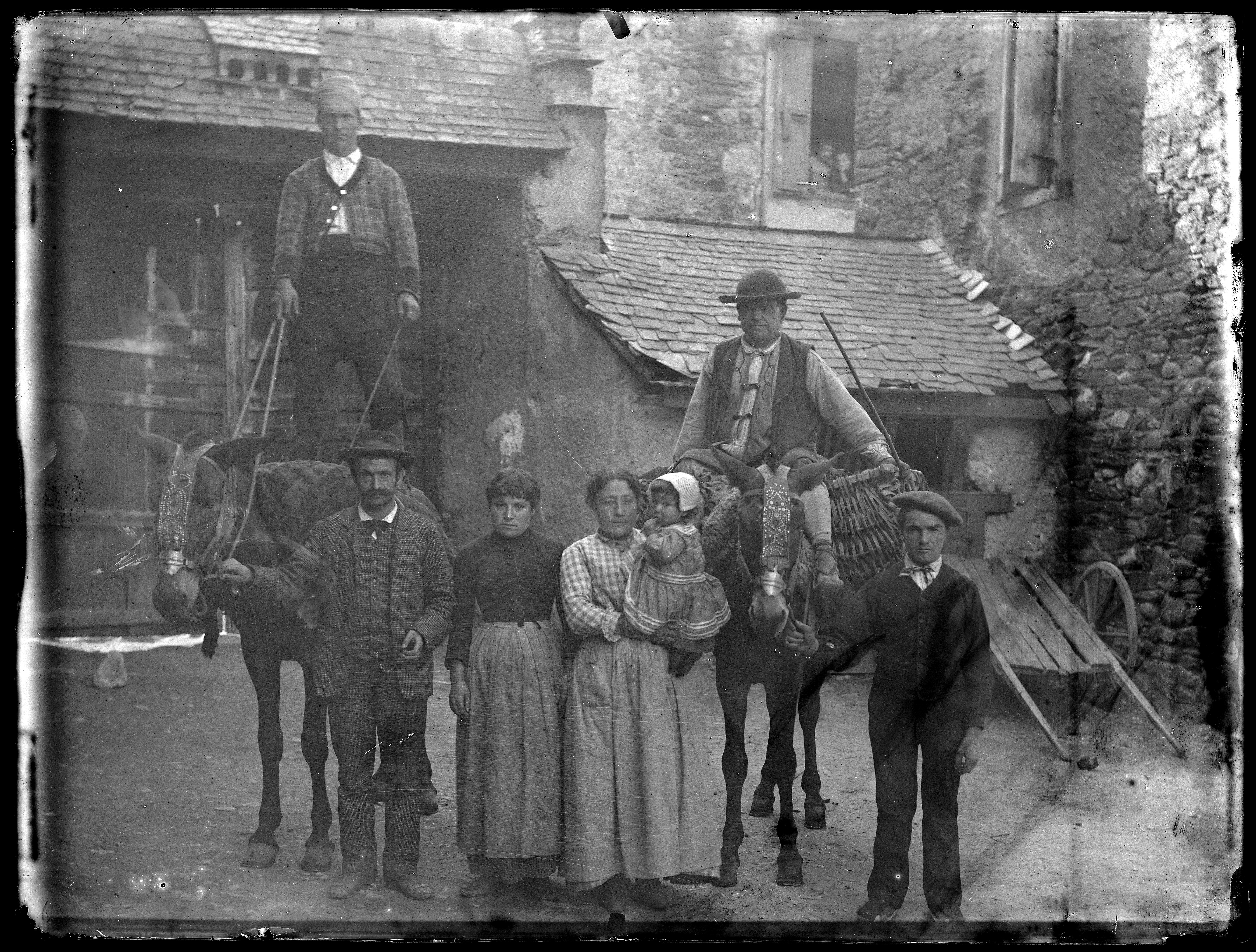 plaque négative au gélatino-bromure d'argent, format 18x24 cm. Sans inscription ni mention d'auteur.